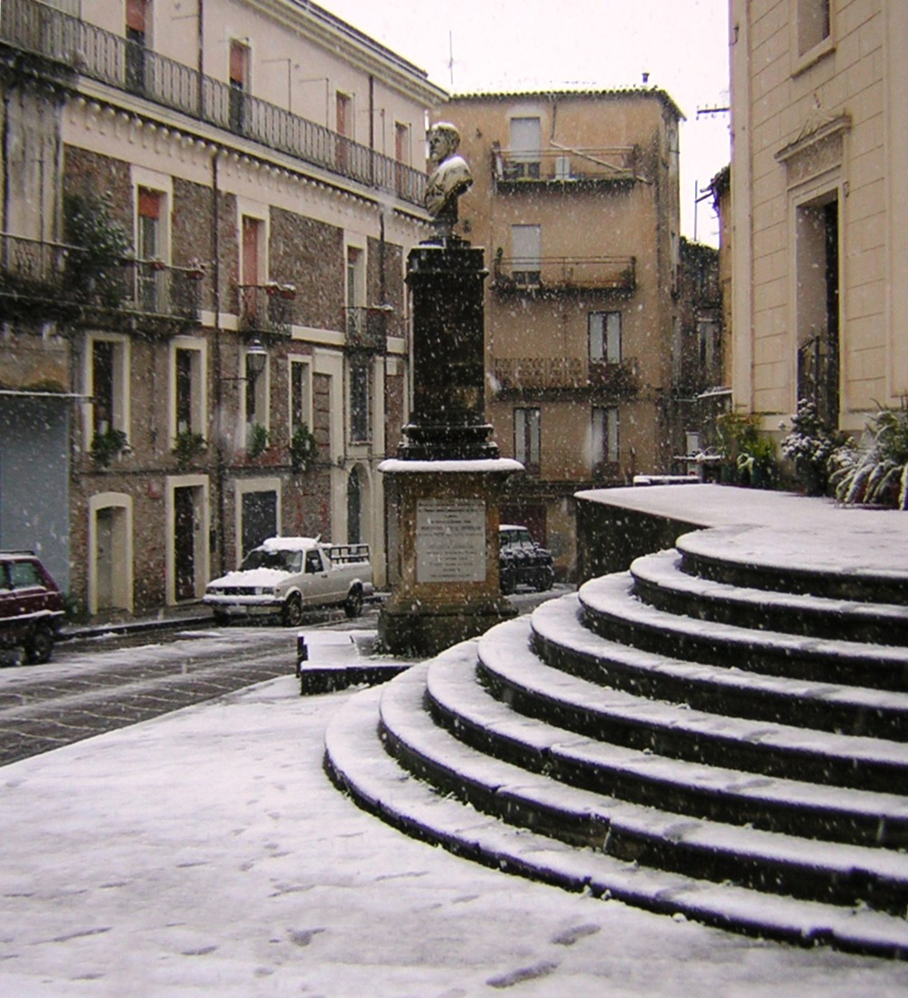 Lamezia Terme: Corso Vittorio Emanuele e Monumento a G. Nicotera durante la nevicata dell'8 marzo 2005. Autore: Francesco Cataudo